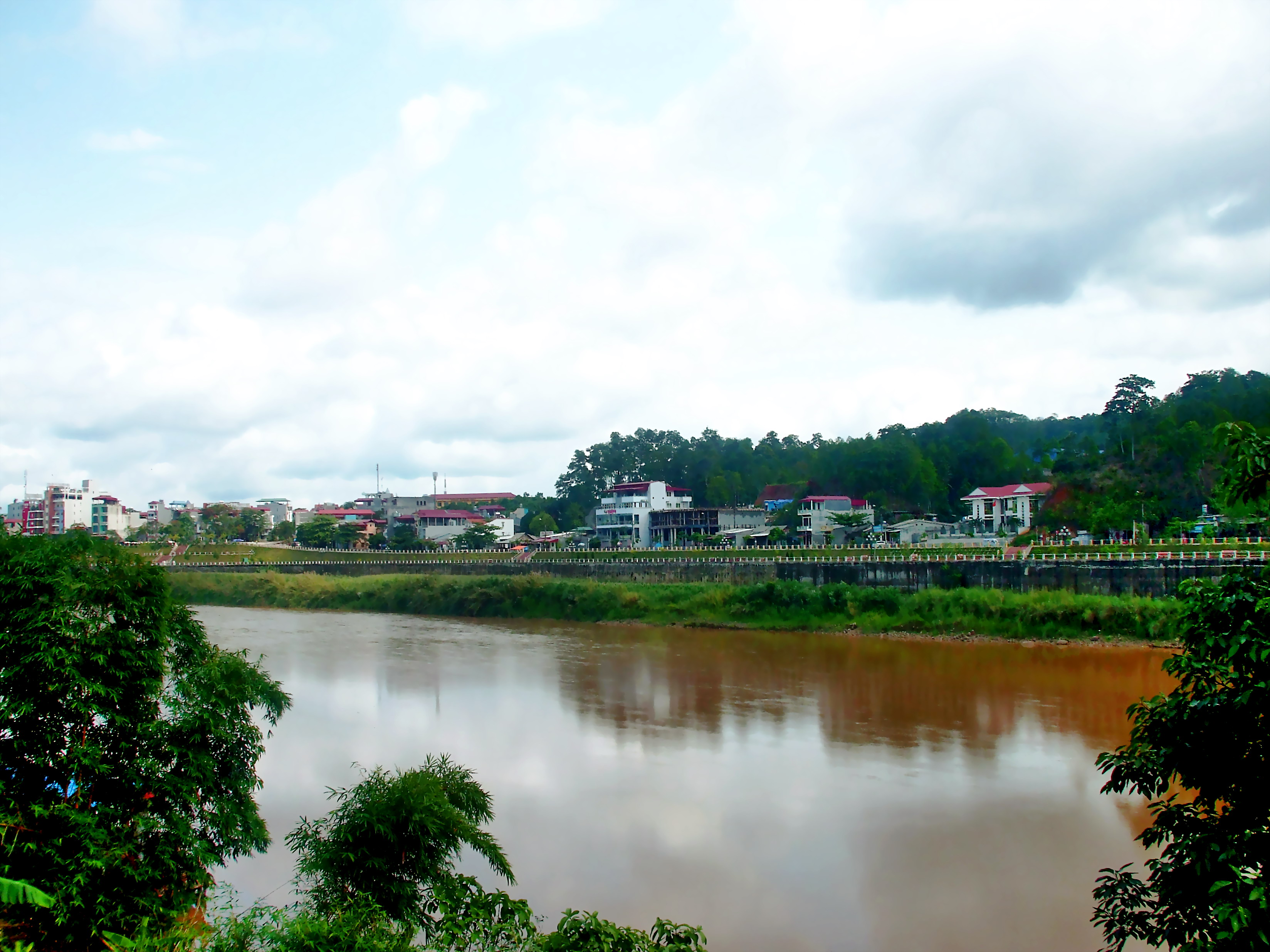 Một phần thành phố Lào Cai (Việt Nam) bên sông Nậm Thi. Ảnh chụp từ bờ thuộc Đông Hưng (Trung Quốc).